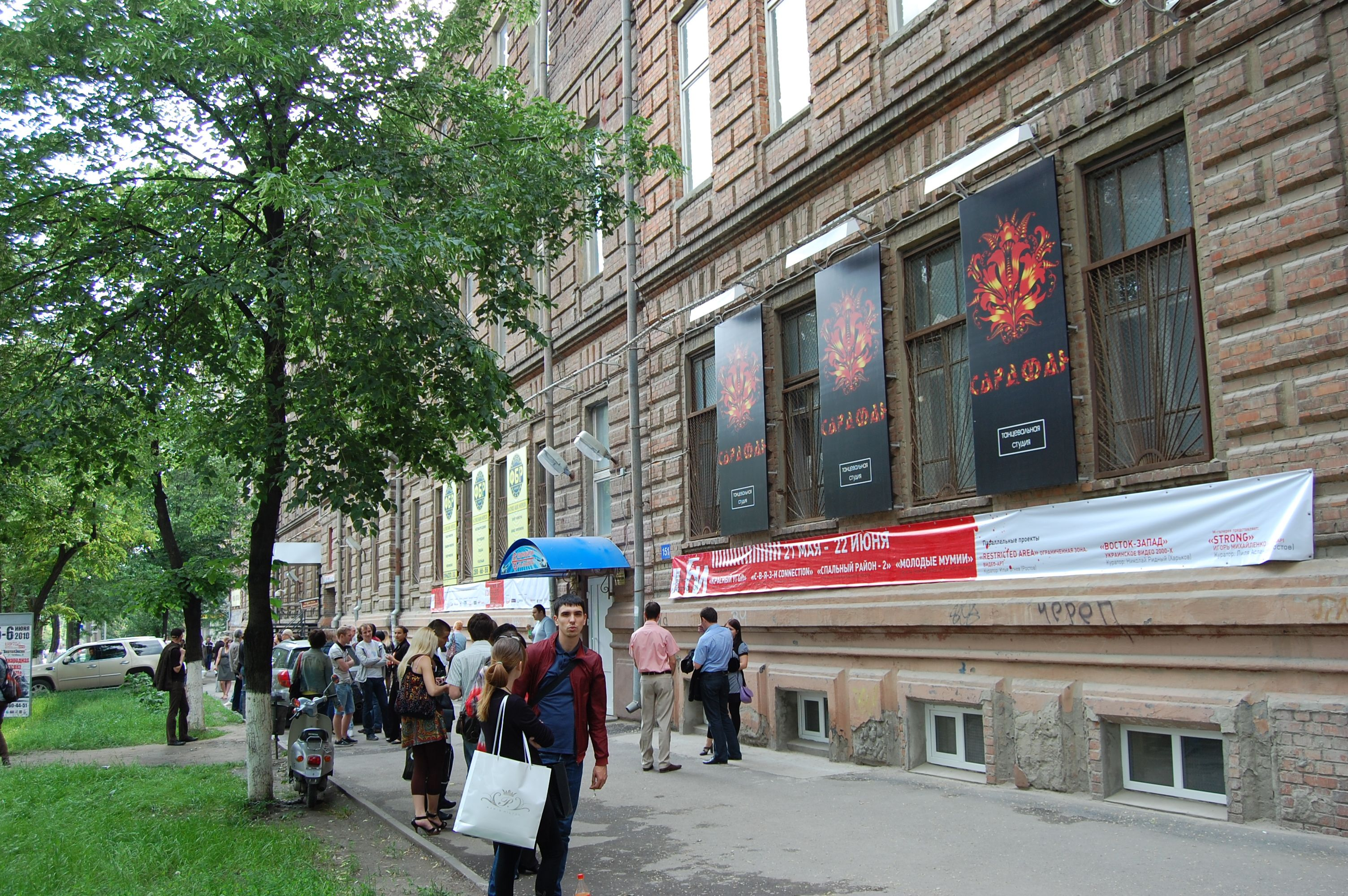 Centr "Tabachnaya fabrika", Rostov-na-Donu